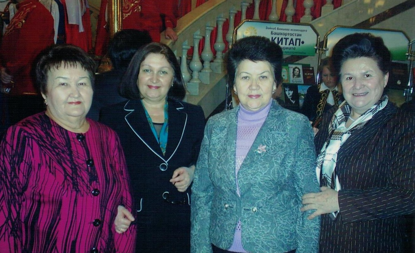 Ғалимәләр Рәйхана Ҡунаҡова, Айһылыу Юнысова, Мәхмүзә Ғәйнуллина һәм шағирә Гүзәл Ситдиҡова